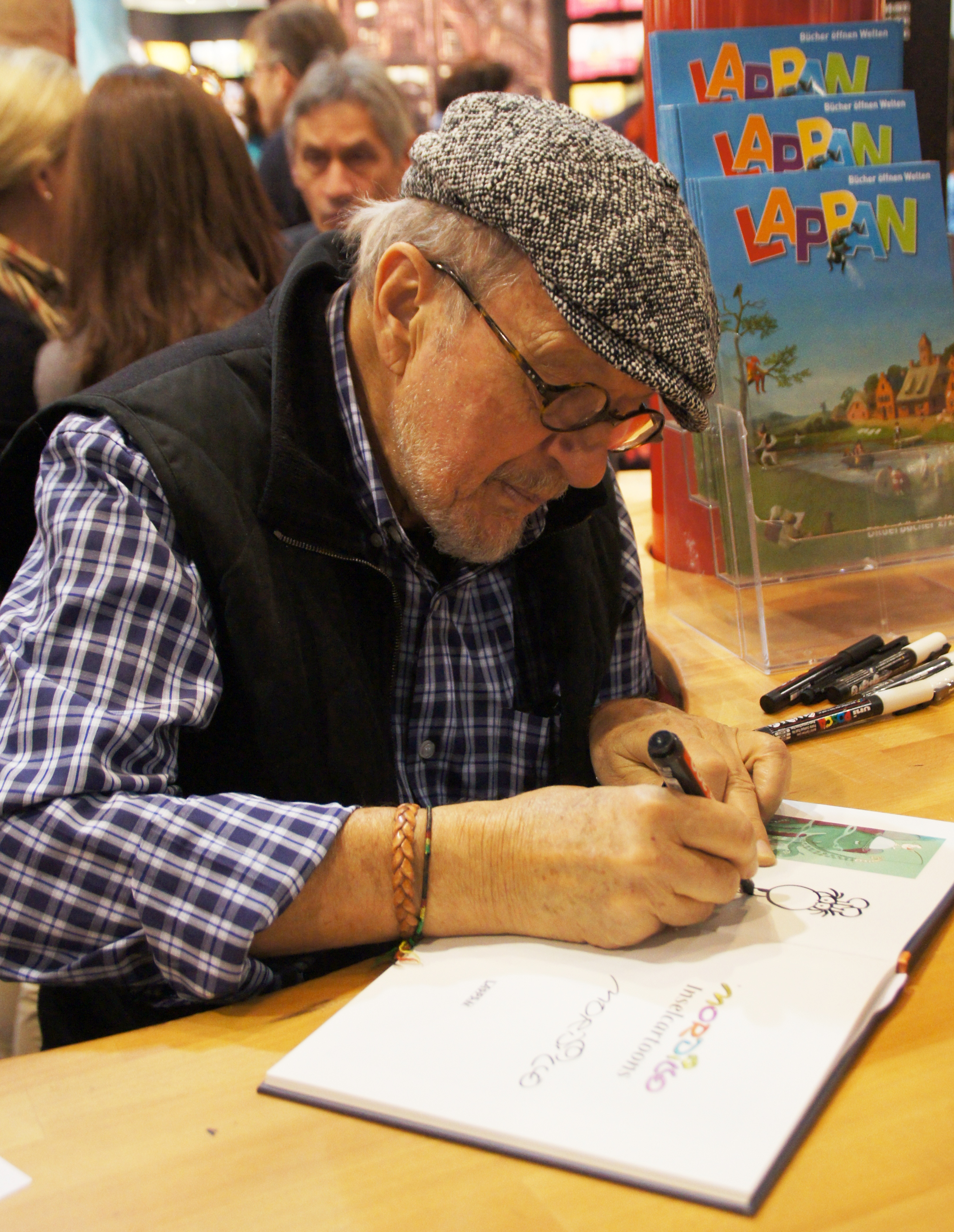 Mordillo signiert seine Cartoon-Bücher auf der Frankfurter Buchmesse 2012 am Stand des Lappan-Verlags.